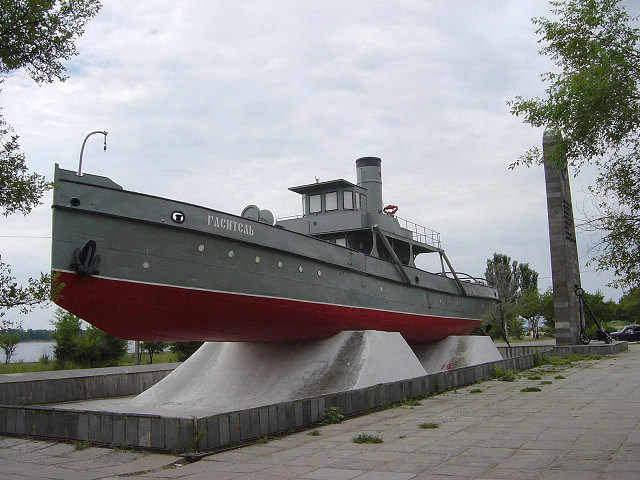 Volgograd. Boot uit WO II. Eigen foto, Mark Voorendt, juli 2005.